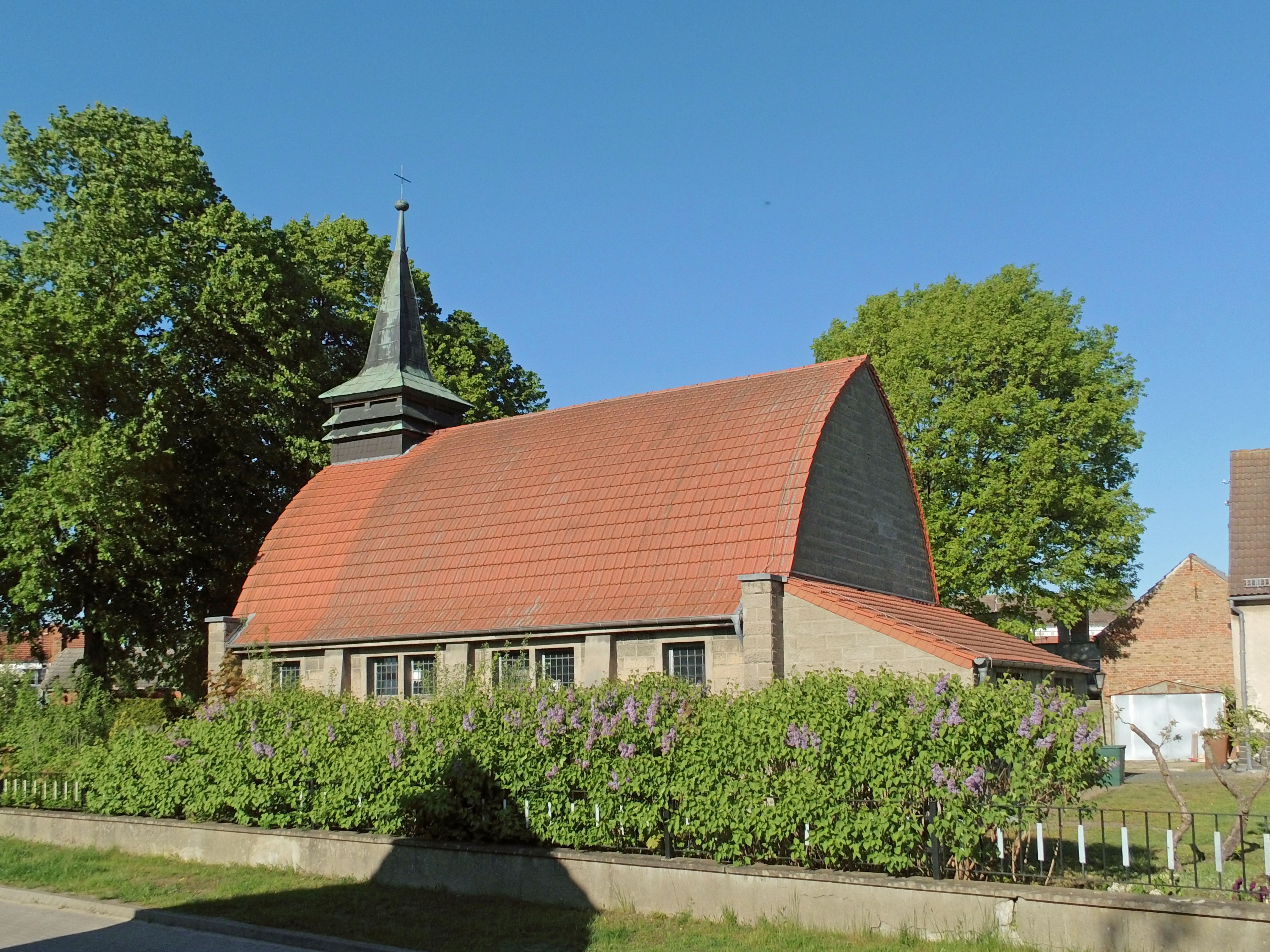 Ehemalige katholische St.-Bernhard-Kirche in Goldbeck (Landkreis Stendal), Ansicht von Südwesten.